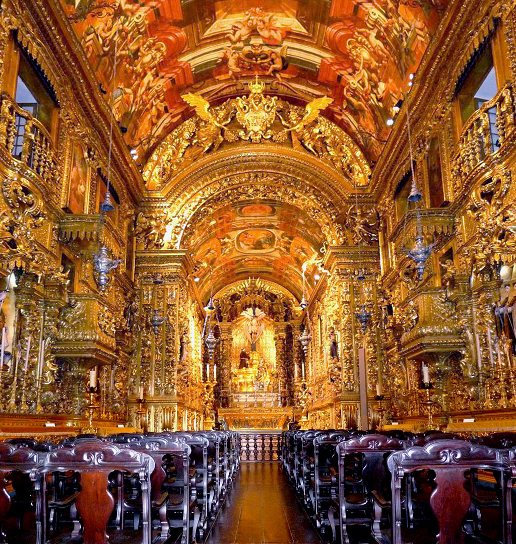 Igreja da Ordem Terceira de São Francisco da Penitência (Rio de Janeiro) Brasil. Foto por cortesia de